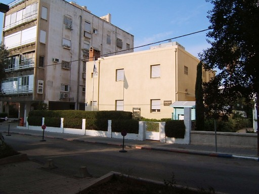 בית בן-גוריון בתל אביב